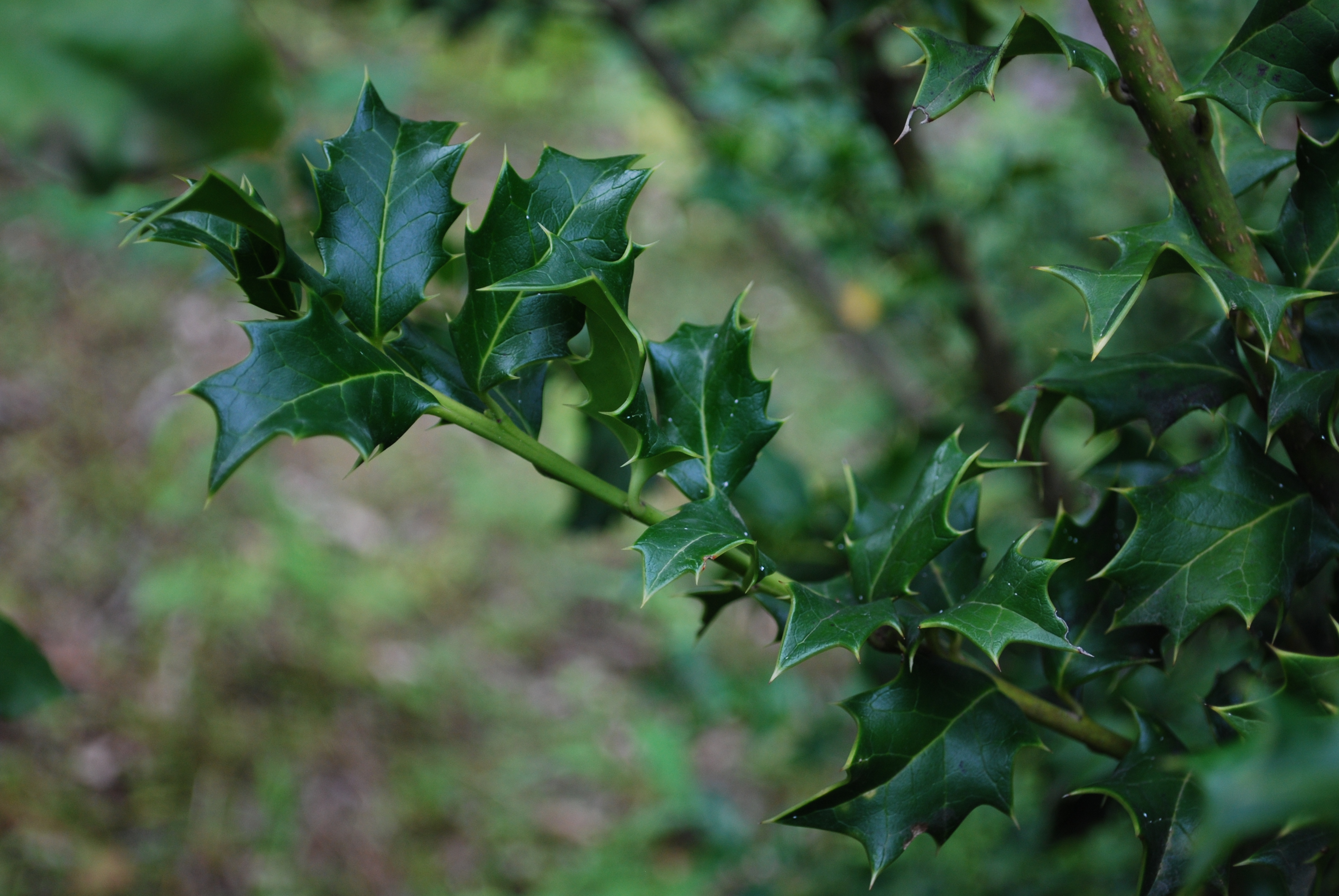 Падуб колхидский. Безымянный комплекс лесного и горного ландшафта, Сочи This image is related to the protected area of Russia number 2310354